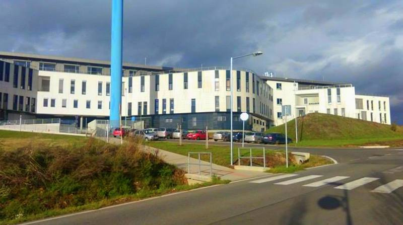 My own picture